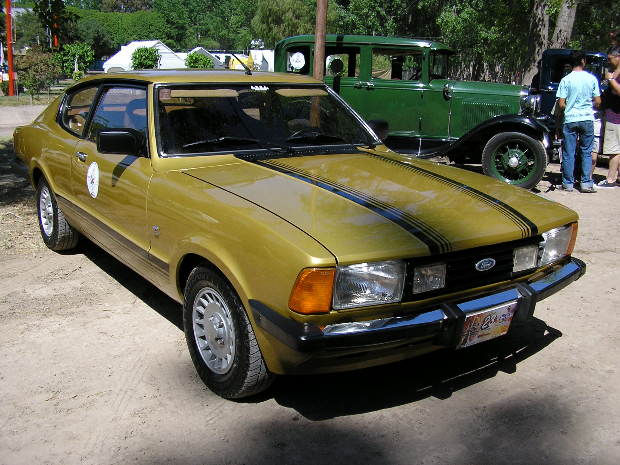 Ford Taunus Cóupe SP (Argentina) (1981-1984)